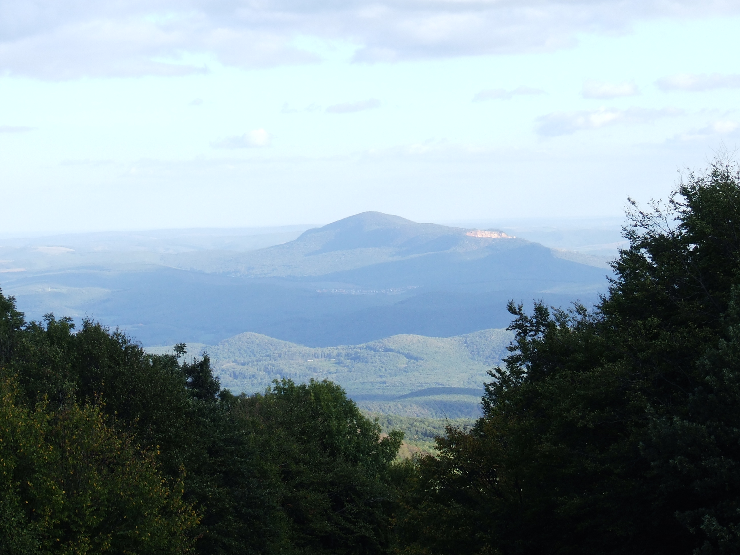 Nagy-Hideg-hegy, kilátás